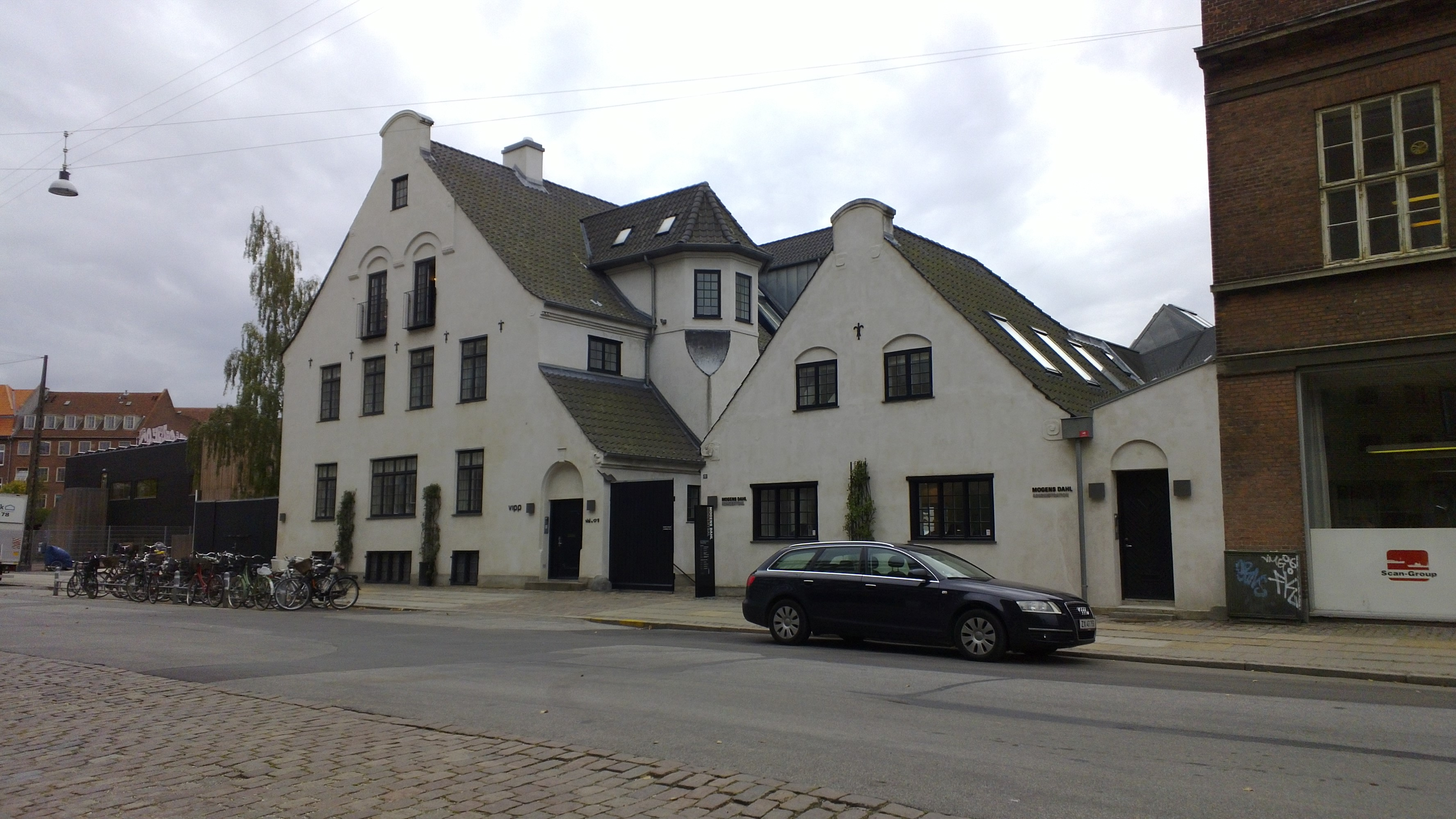 Mogens Dahl Koncertsal in Copenhagen, Denmark